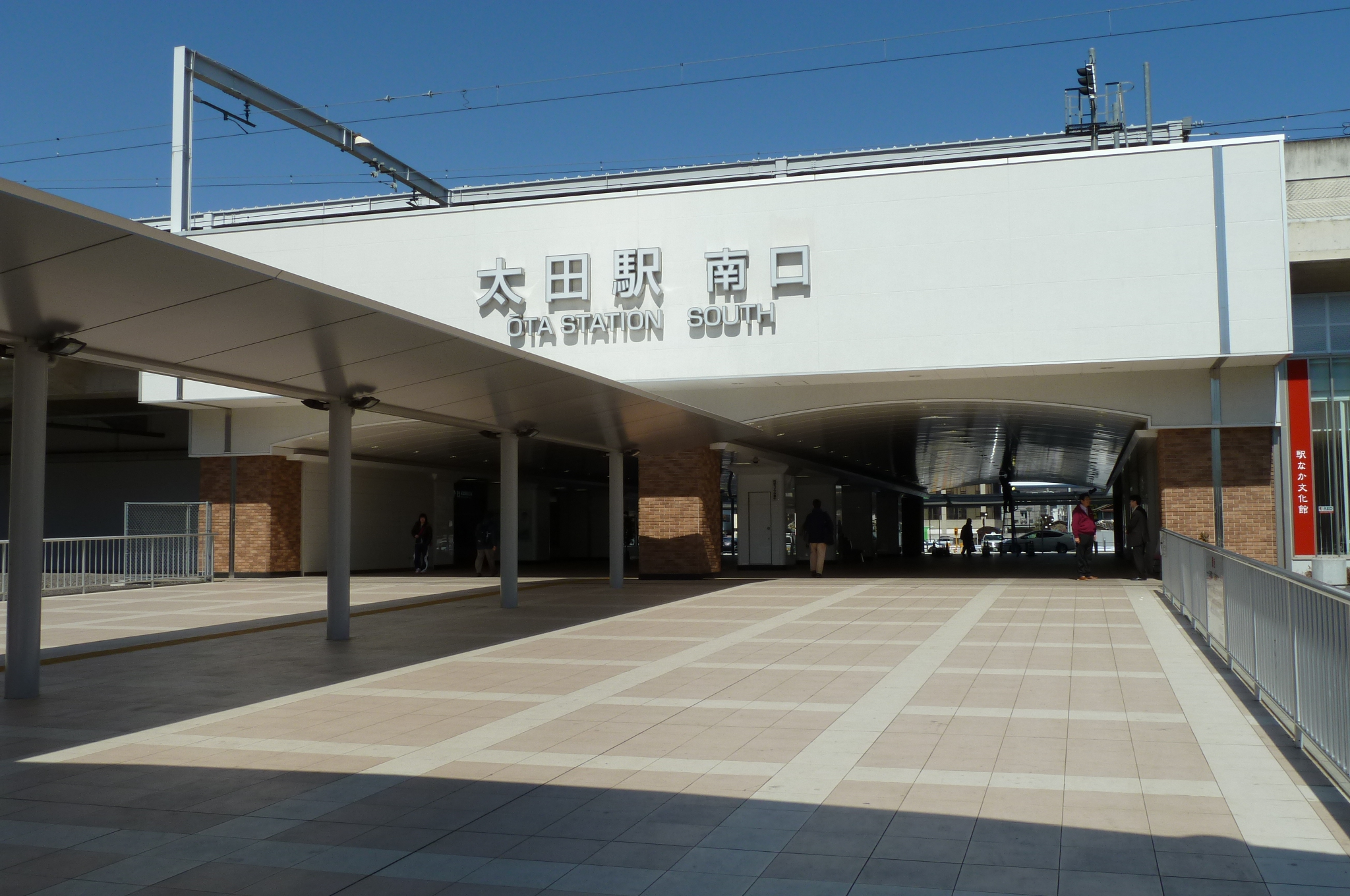 太田駅